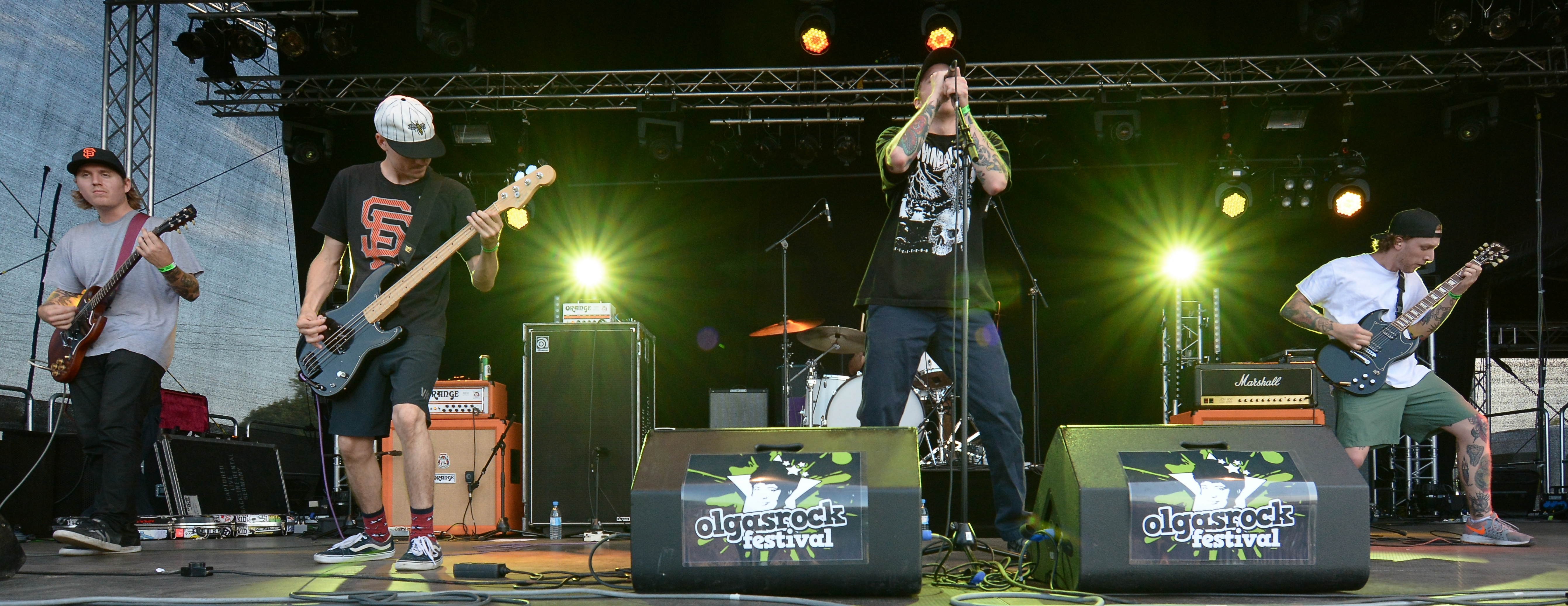 The Story So Far bei Olgas Rock 2015